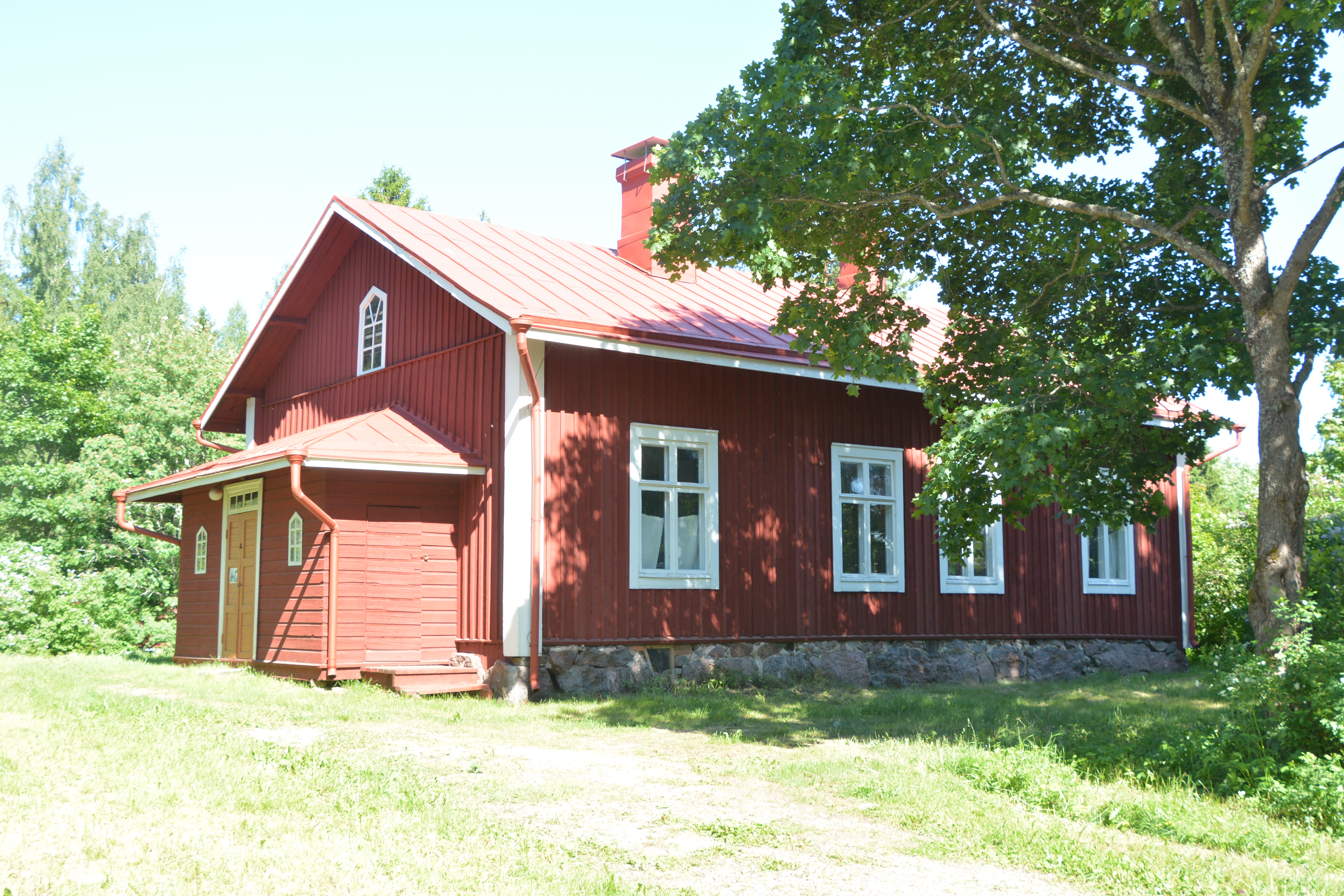 Nukari skolmuseum, Nukari, Nurmijärvi kommun, Finland